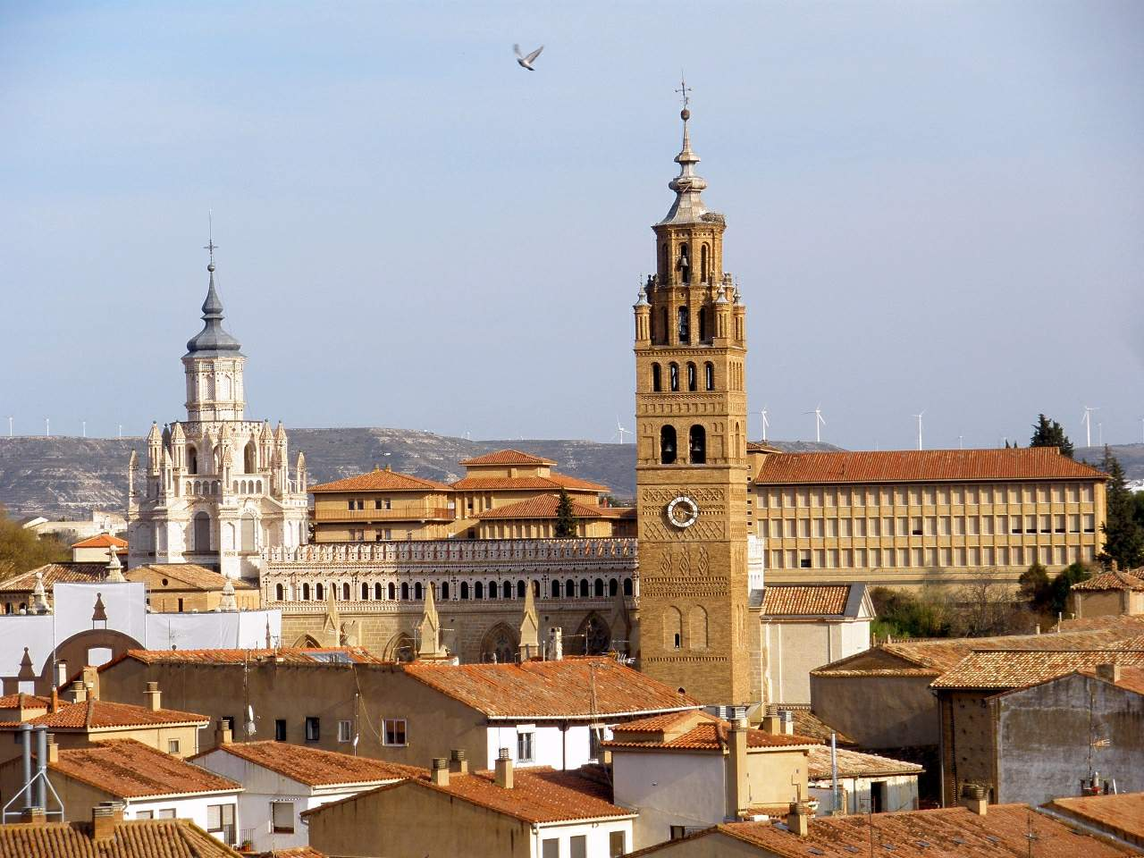 Tarazona Cathedral